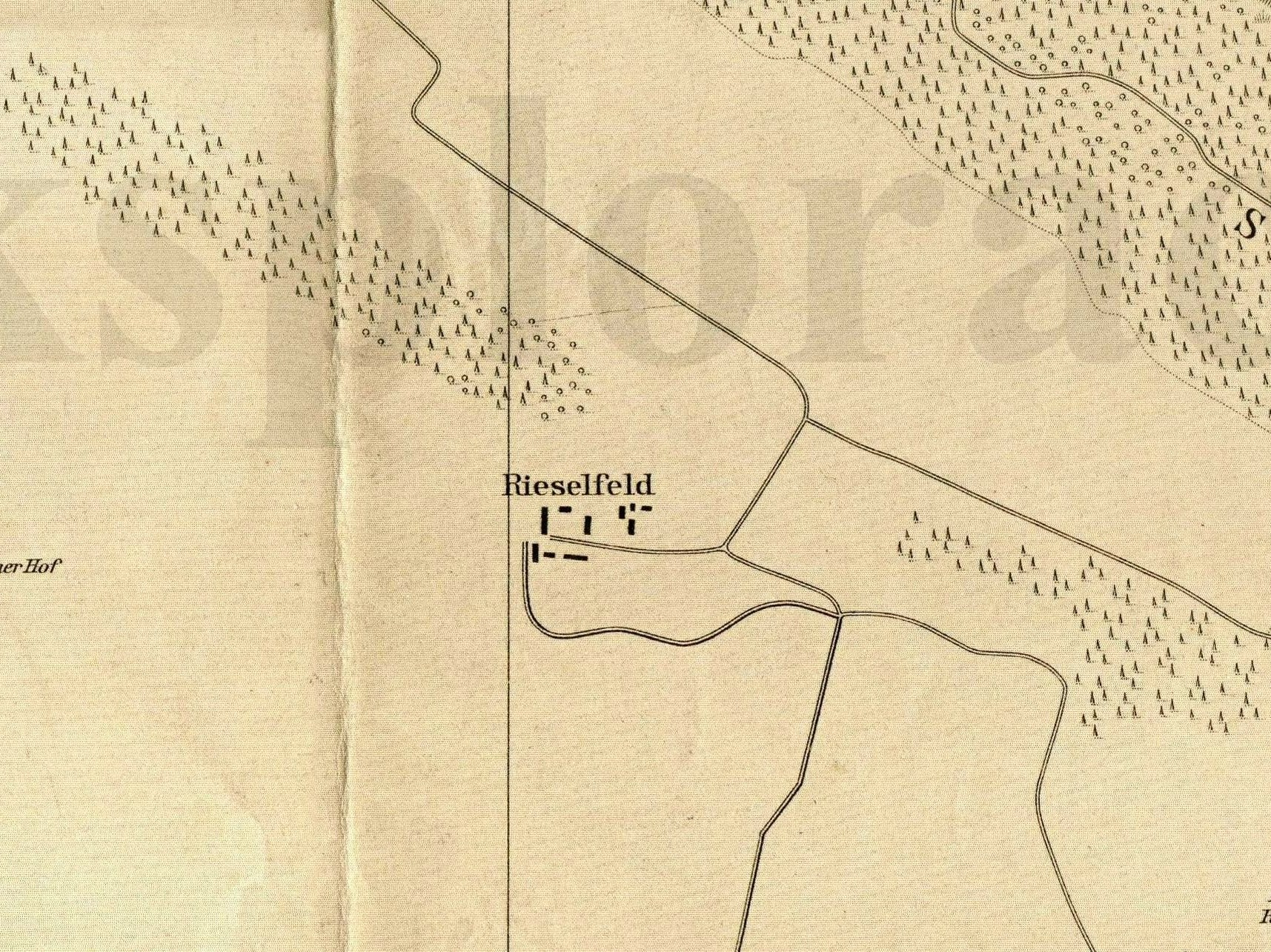 Gdańsk Sączki na mapie z 1909 r.